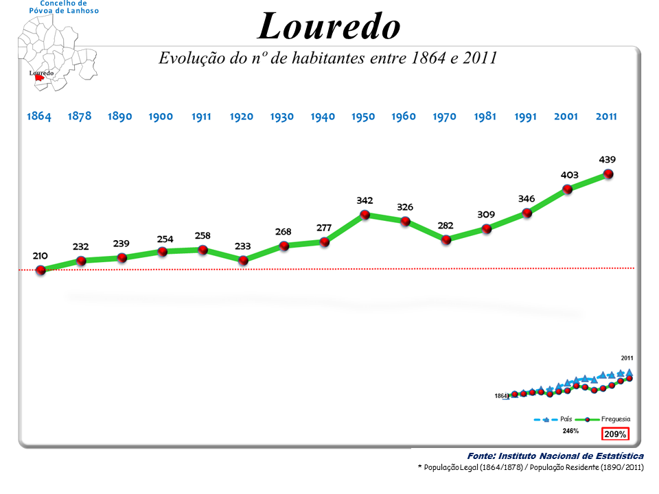 Censos 1864/2011